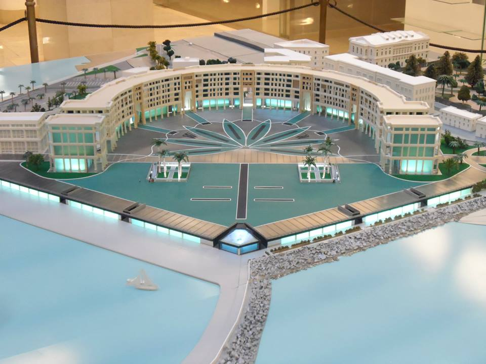 Foto del plastico di piazza della Libertà a Salerno